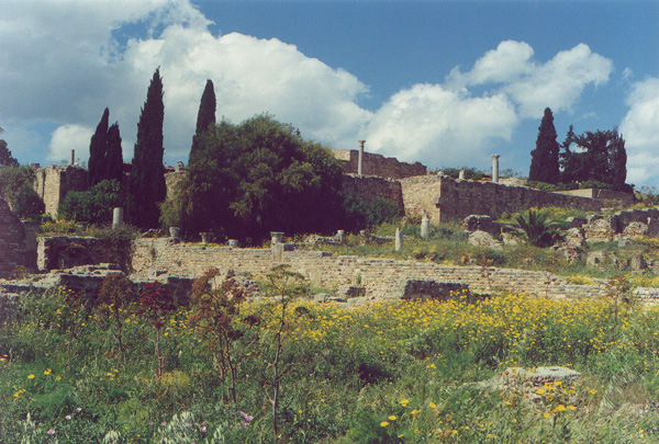 self made